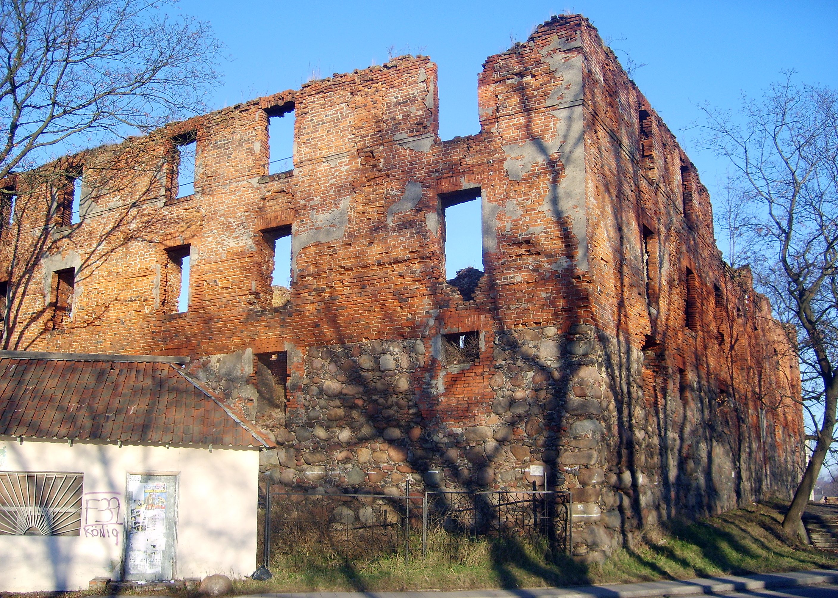 Вид с каменной кладкой времён тевтонского ордена